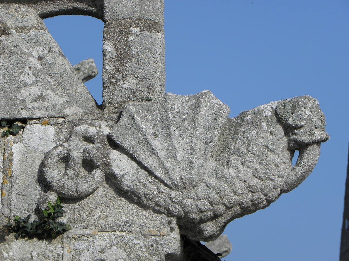 Amortissement de pignon de l'ossuaire de l'église Saint-Goulven à Goulven (29).